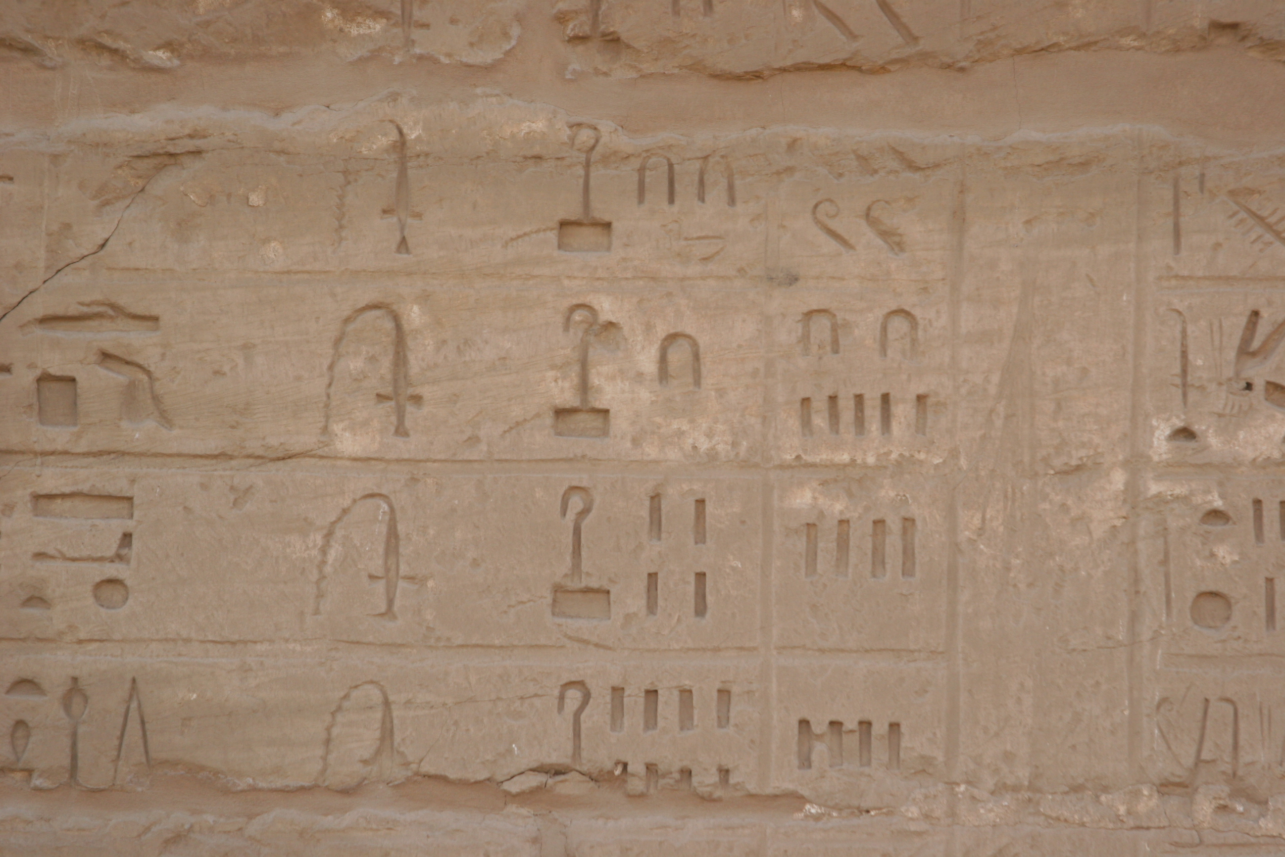 Египет, Экскурсия в Луксор Egypt, travel to Luxor